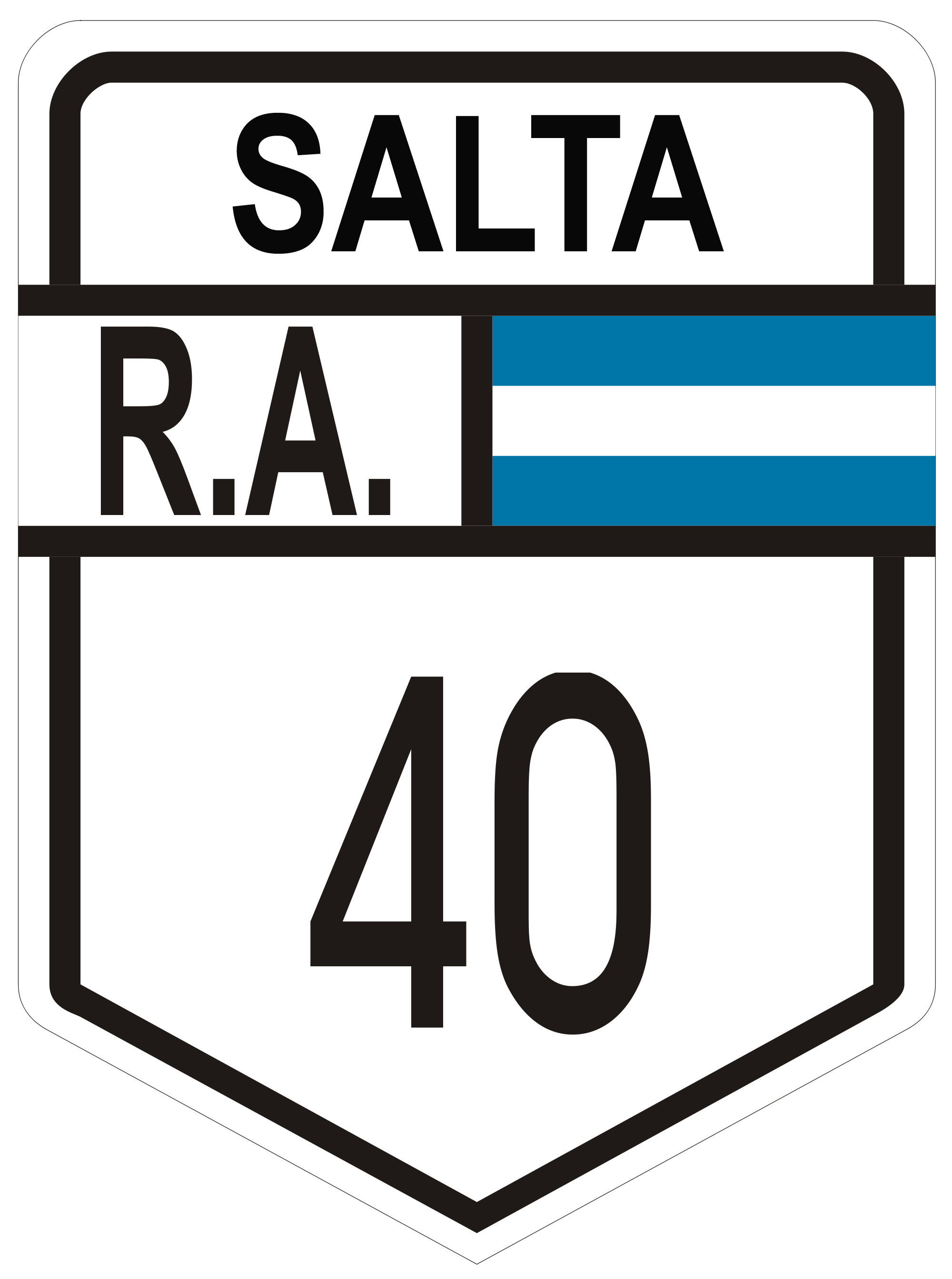 Salta - RN40